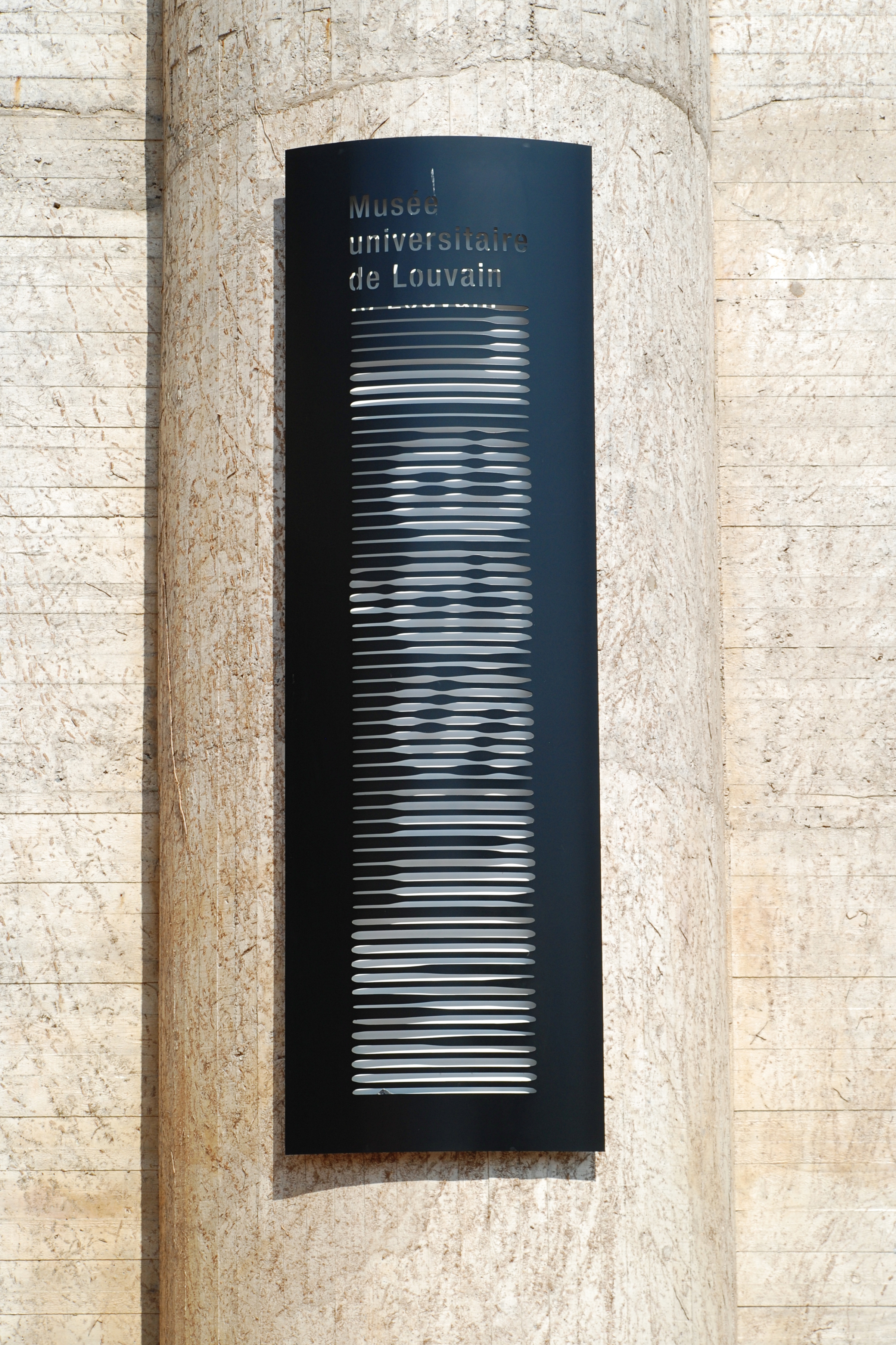 Belgique - Louvain-la-Neuve - Place des Sciences - Bibliothèque des Sciences - logo du Musée L (inauguré en novembre 2017) This photo of immovable heritage has been taken in the Walloon Region